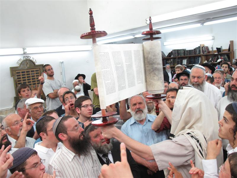 ישיבת מרכז הרב.